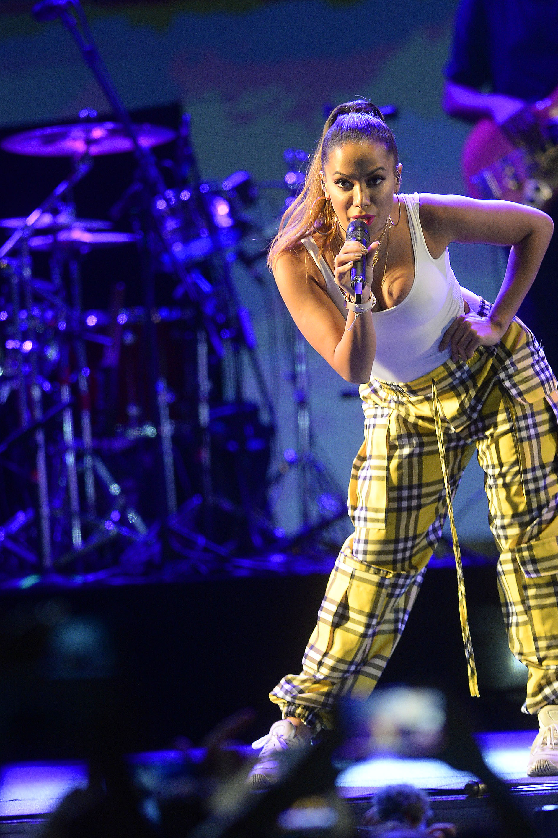 A capital comemora o seu 59º aniversário com shows de ritmos variados na Esplanada dos Ministérios na noite deste domingo (21/04). Fotos: Joel Rodrigues/ Agência Brasilia